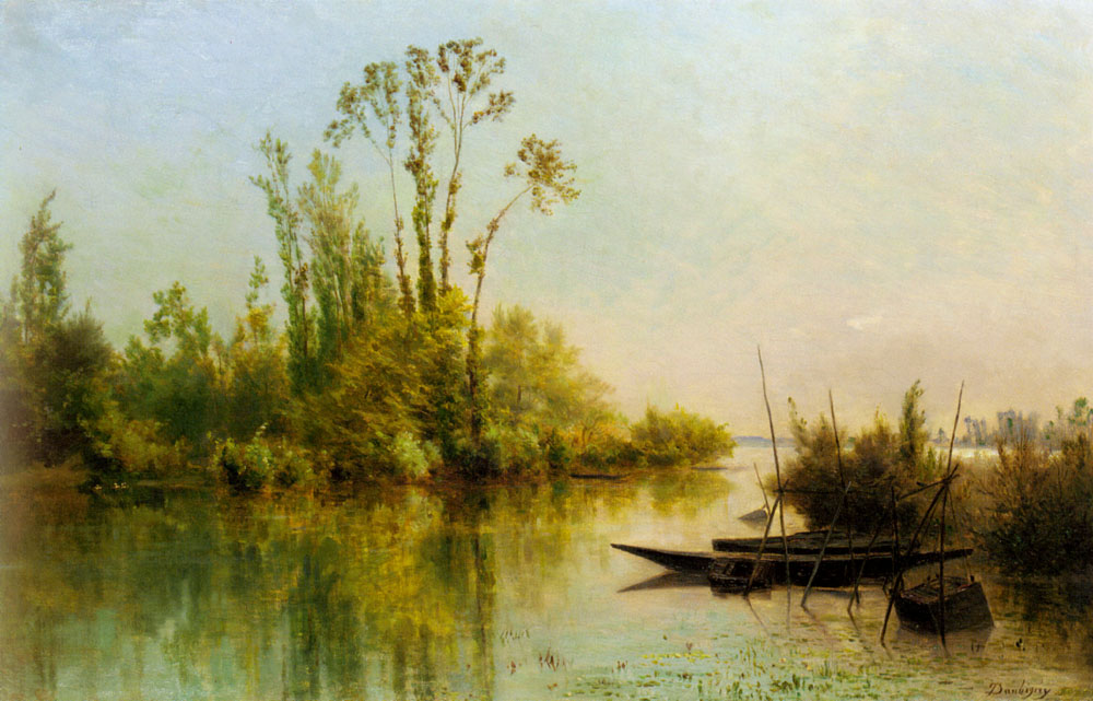 Les Iles Vierges a Bezonstitle QS:P1476,fr:"Les Iles Vierges a Bezons" label QS:Lfr,"Les Iles Vierges a Bezons"